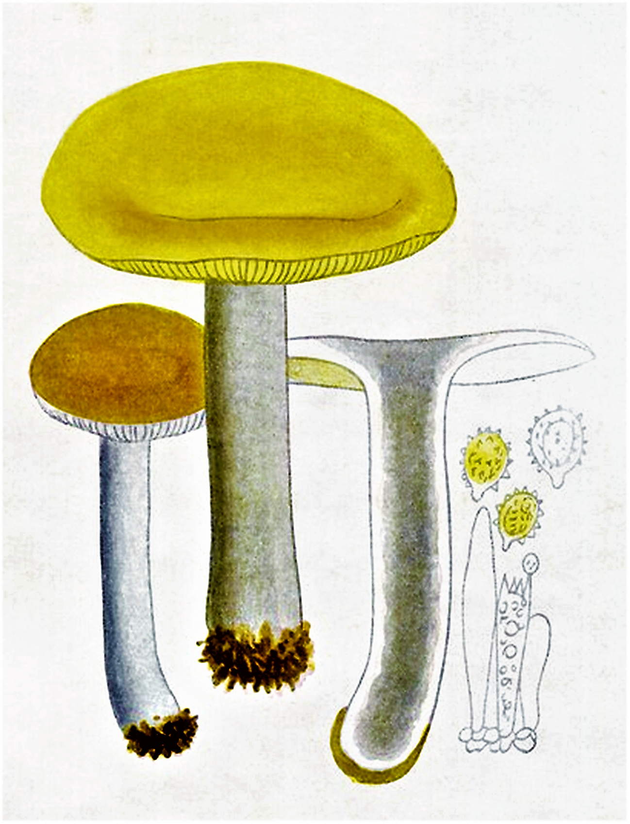 Giacomo Bresadola: Russula flava Romell (1895), heute Russula claroflava Grove (1888)